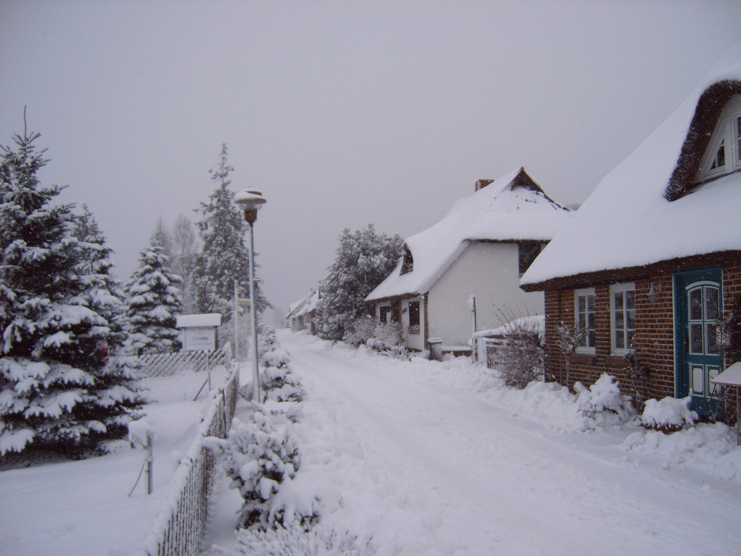 Moritzdorf, Ortsteil von Sellin Bild aufgenommen am 29.12.2005 durch Olaf Meister